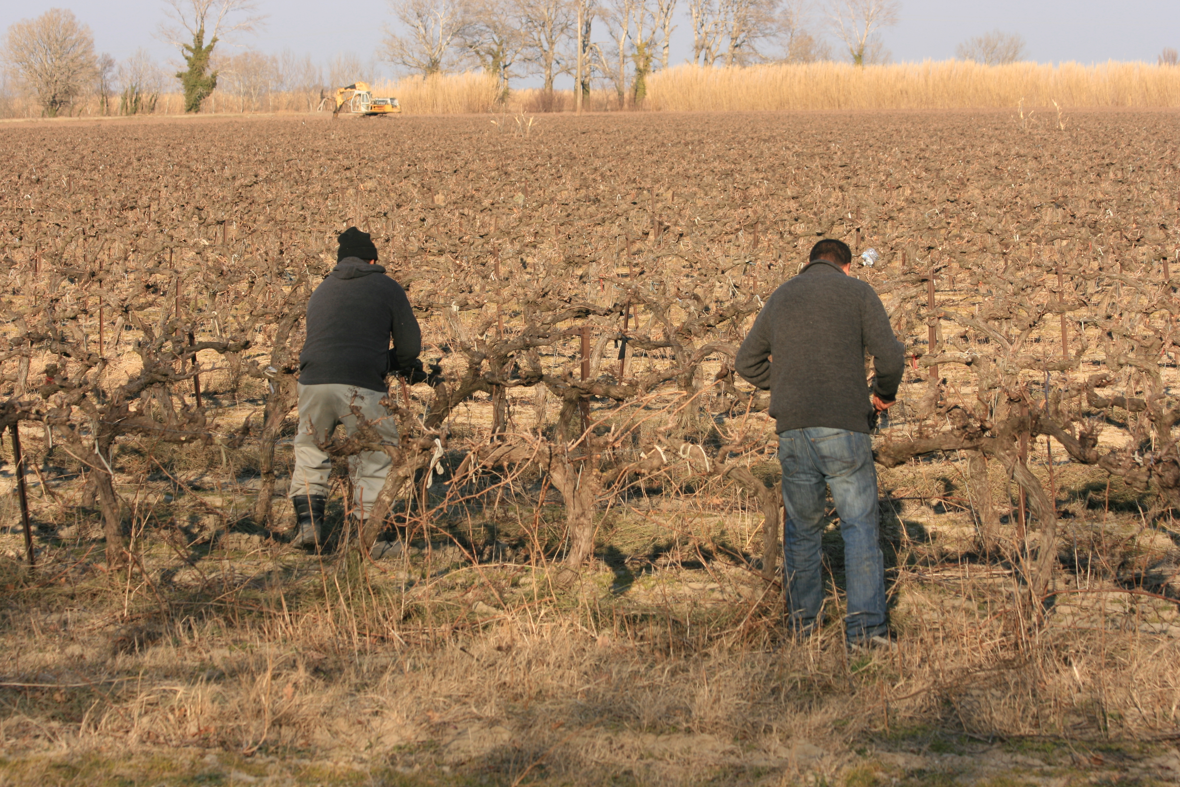 Taille manuelle des vignes en février